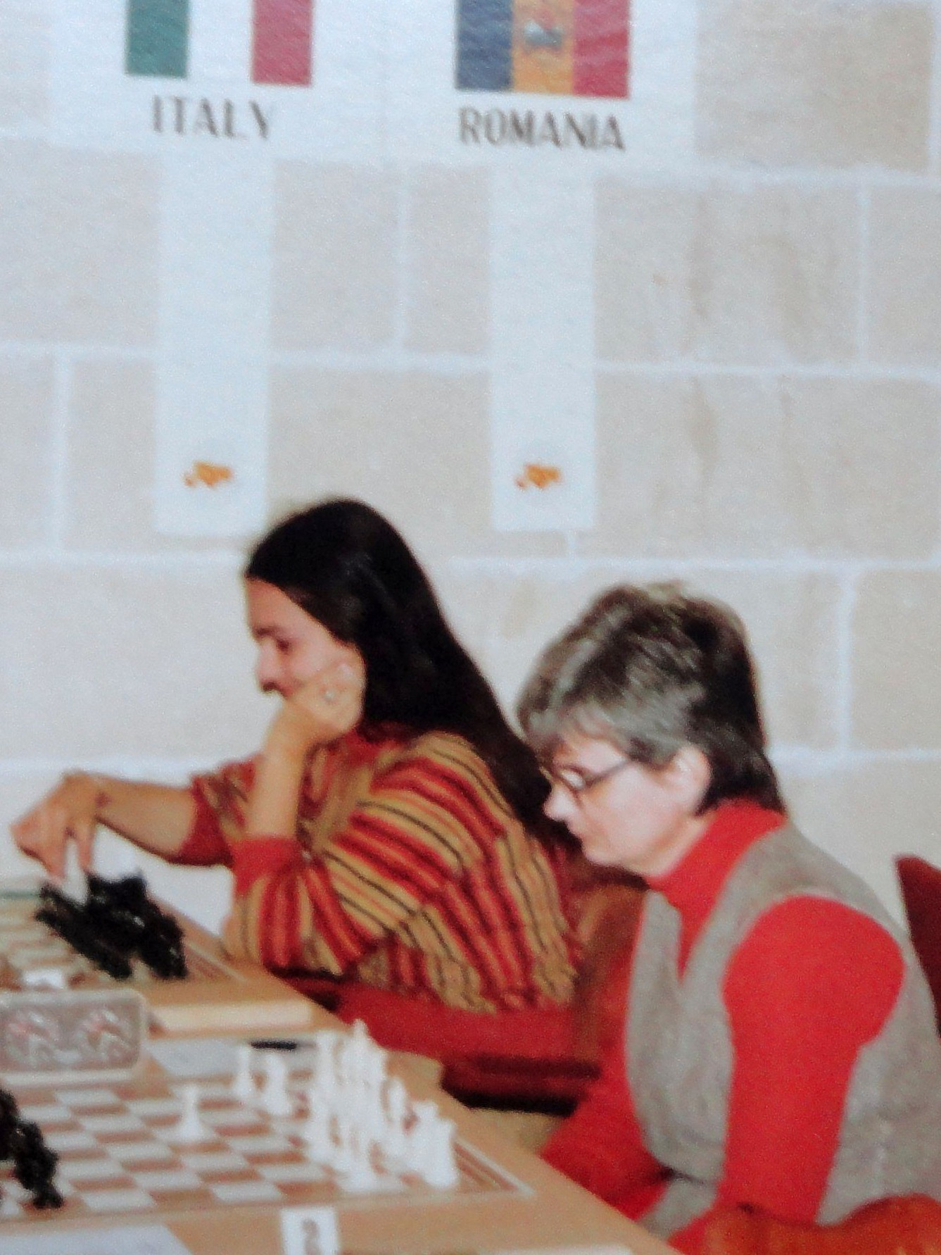 Daniela Nutu und Gertrude Baumstark, Schacholympiade 1980 in Valletta auf Malta.